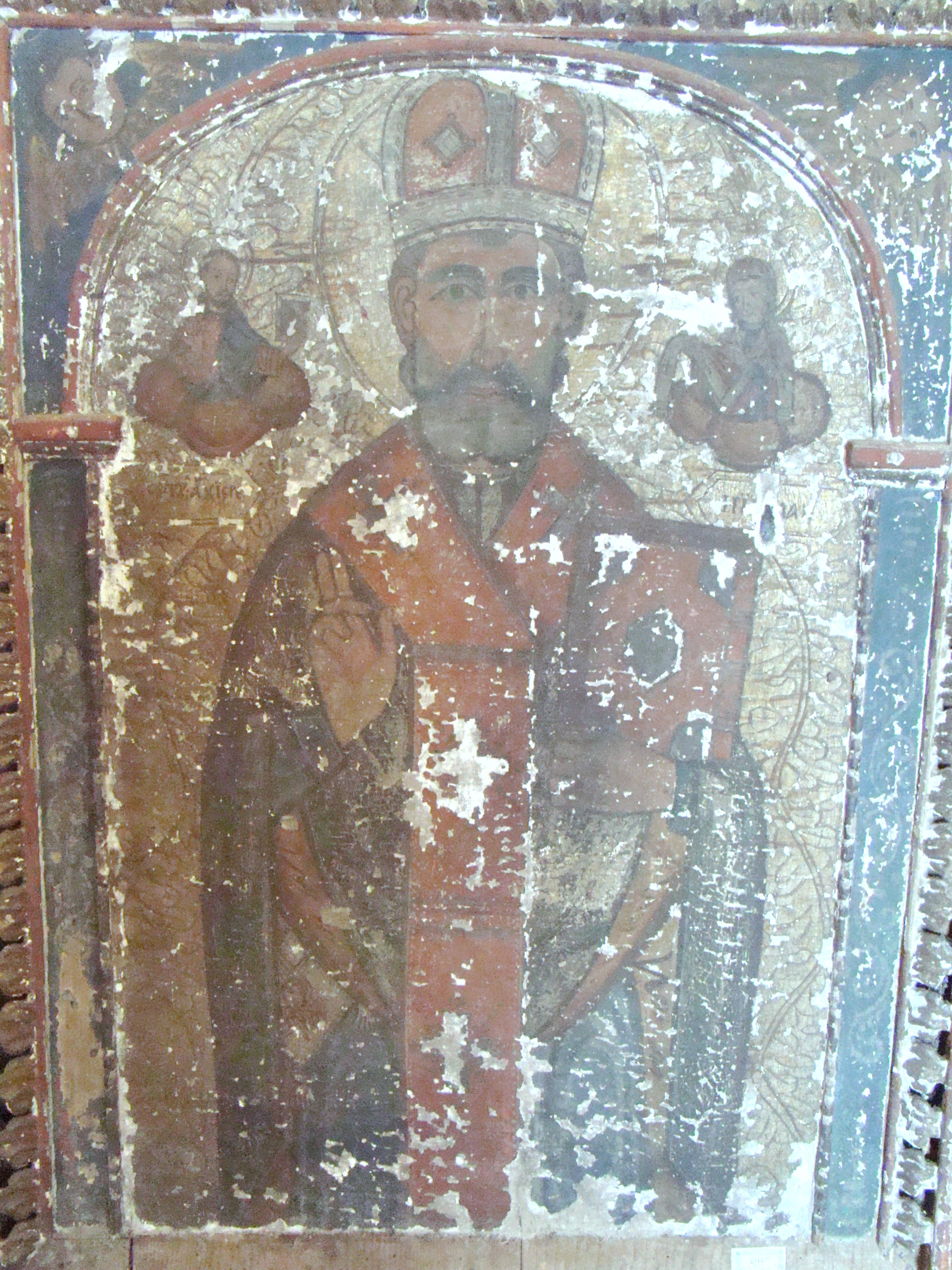 Biserica de lemn Sf.Nicolae din Sârbi Josani